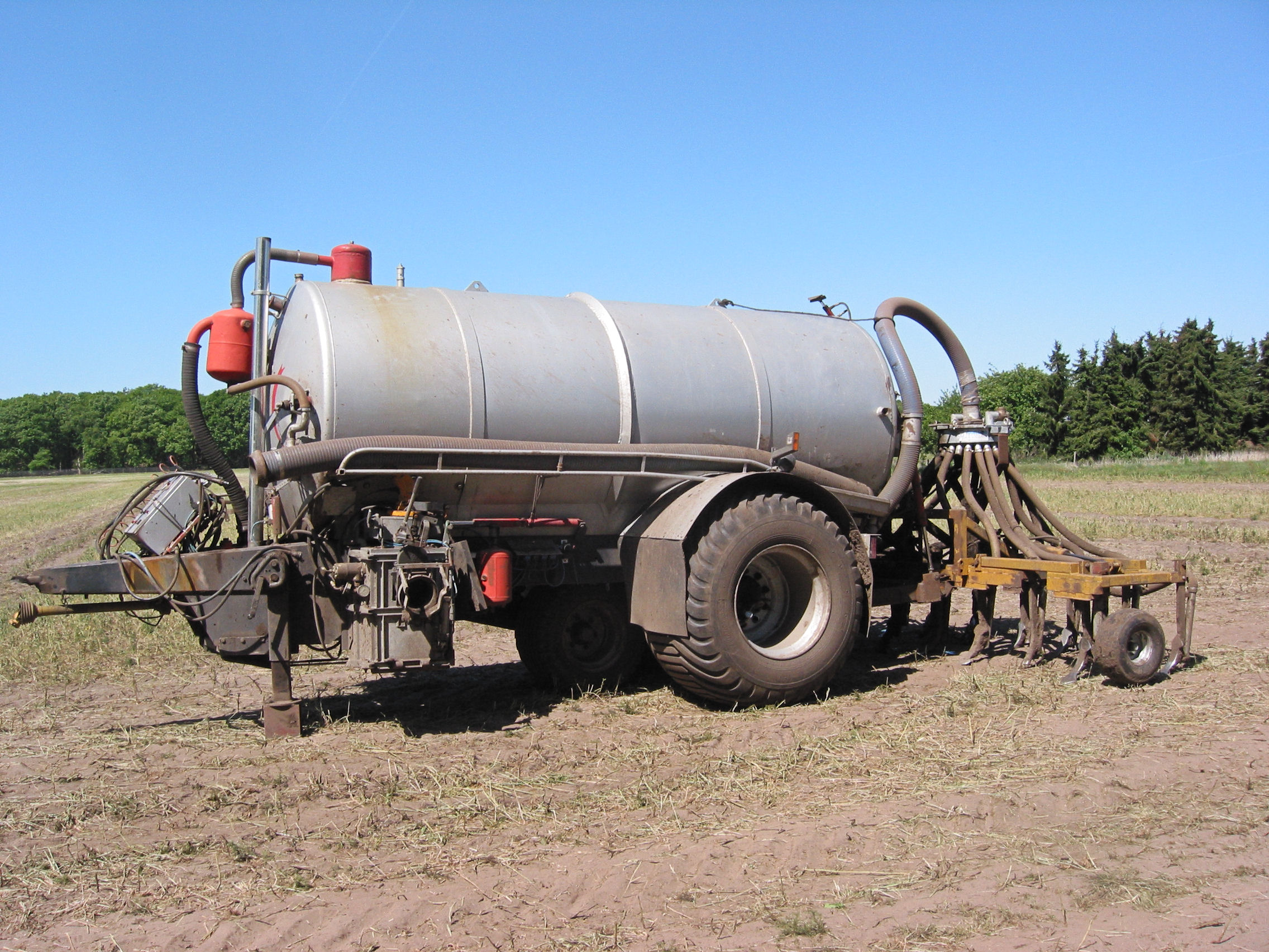 Sleufkouterbemester